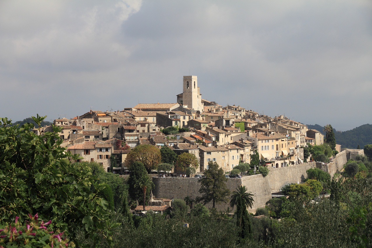 Panorama de St-Paul-de-Vence depuis le chemin de Sainte-Claire en août 2012, PACA, France.